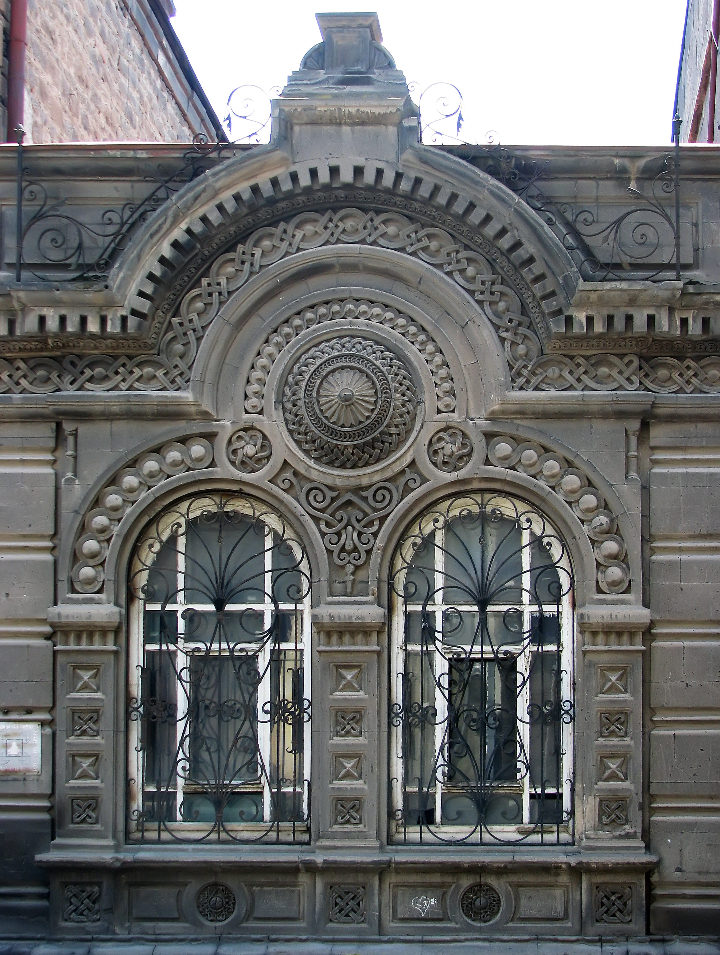 Շենքը կառուցվել է 1876 թ.: Կառուցումից ի վեր մինչև 1920 թ. շենքը ծառայել է որպես Հայաստանում Պարսկաստանի հյուպատոսարան: Այնուհետև այն տրվել է Հայ Օգնության Կոմիտեին, որի ղեկավարն էր բանաստեղծ Հովհաննես Թումանյանը: 1964 թ.-ից շենքը տրվել է Պատմամշակութային հուշարձանների պահպանման ընկերակցությանը, որը նախագահում էր նկարիչ Մարտիրոս Սարյանը: Որմնանկարները թվագրվում են շենքի կառուցման ժամանակաշրջանին: Ոճը արևելյան է, գերիշխողը պարսկական: Հարուստ է նաև հայկական մոտիվներով: 6/203.13